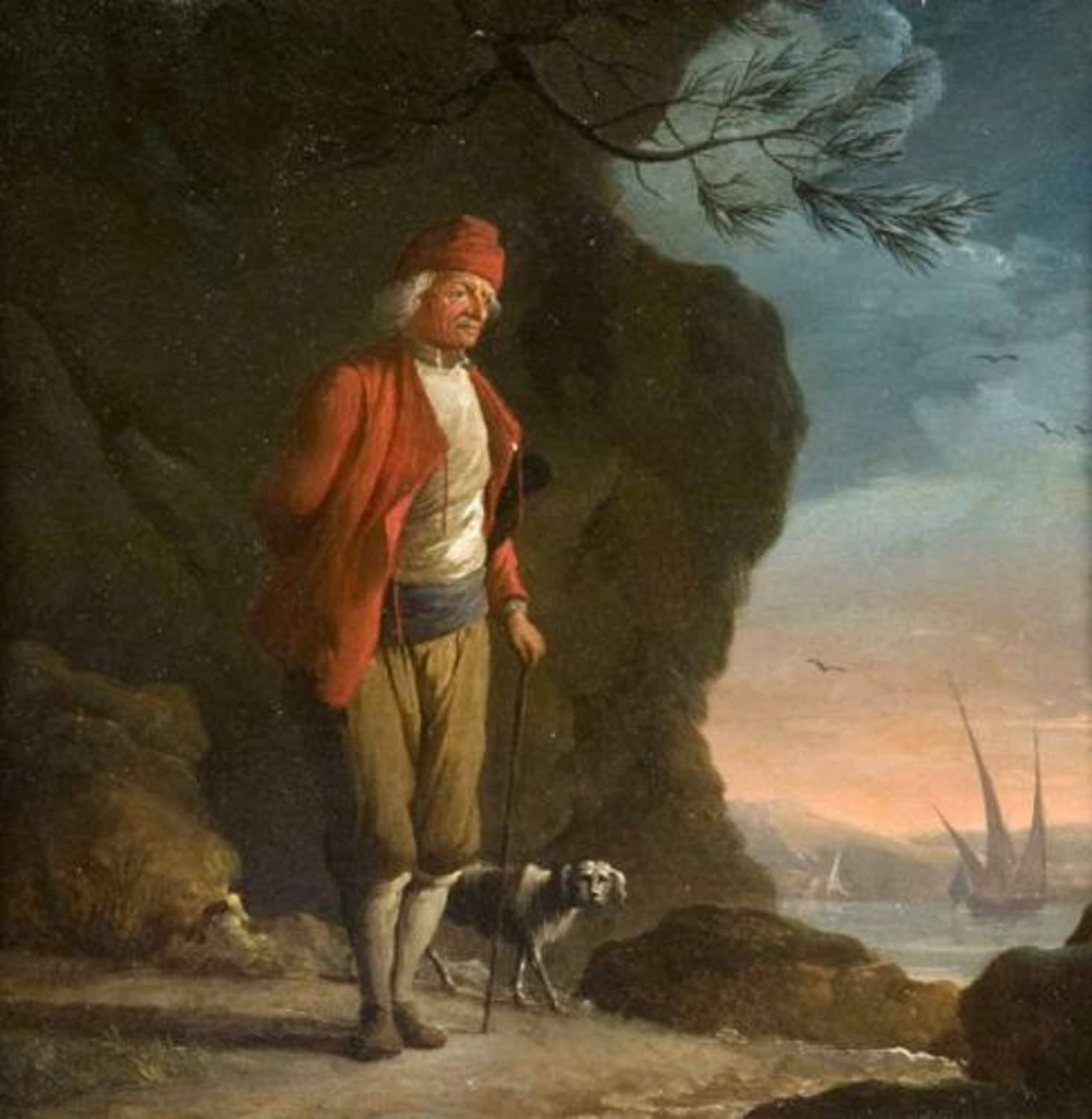 Portrait d'Annibal Camoux, Marseillais célèbre, mort à 101 ans